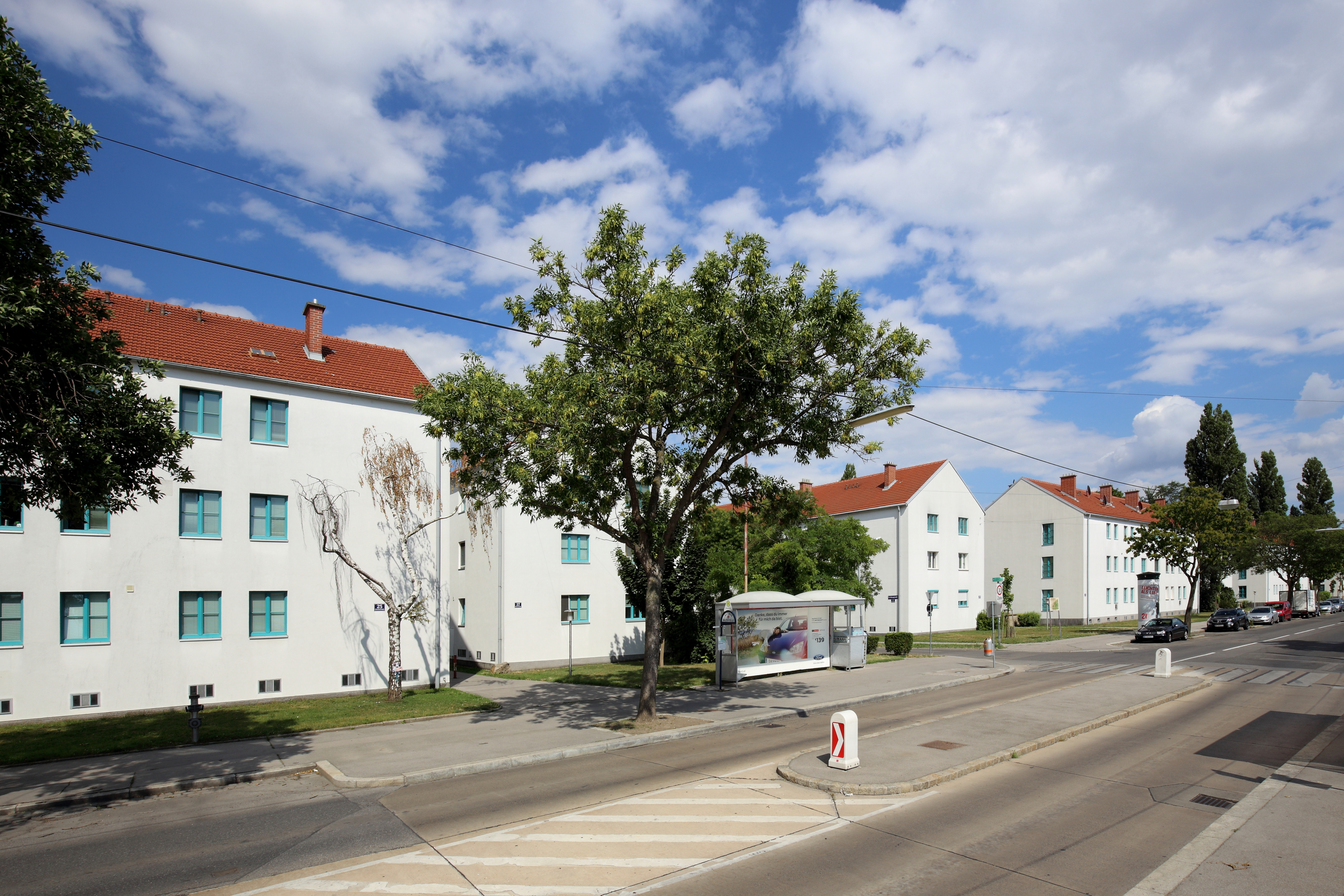 Die zwischen 1950 und 1954 nach Plänen des Architekten Franz Schuster errichtete und denkmalgeschützte Wohnhausanlage der Gemeinde Wien in der Siemensstraße 21-55 in Großjedlersdorf, ein Ortsteil im 21. Wiener Gemeindebezirk Floridsdorf.